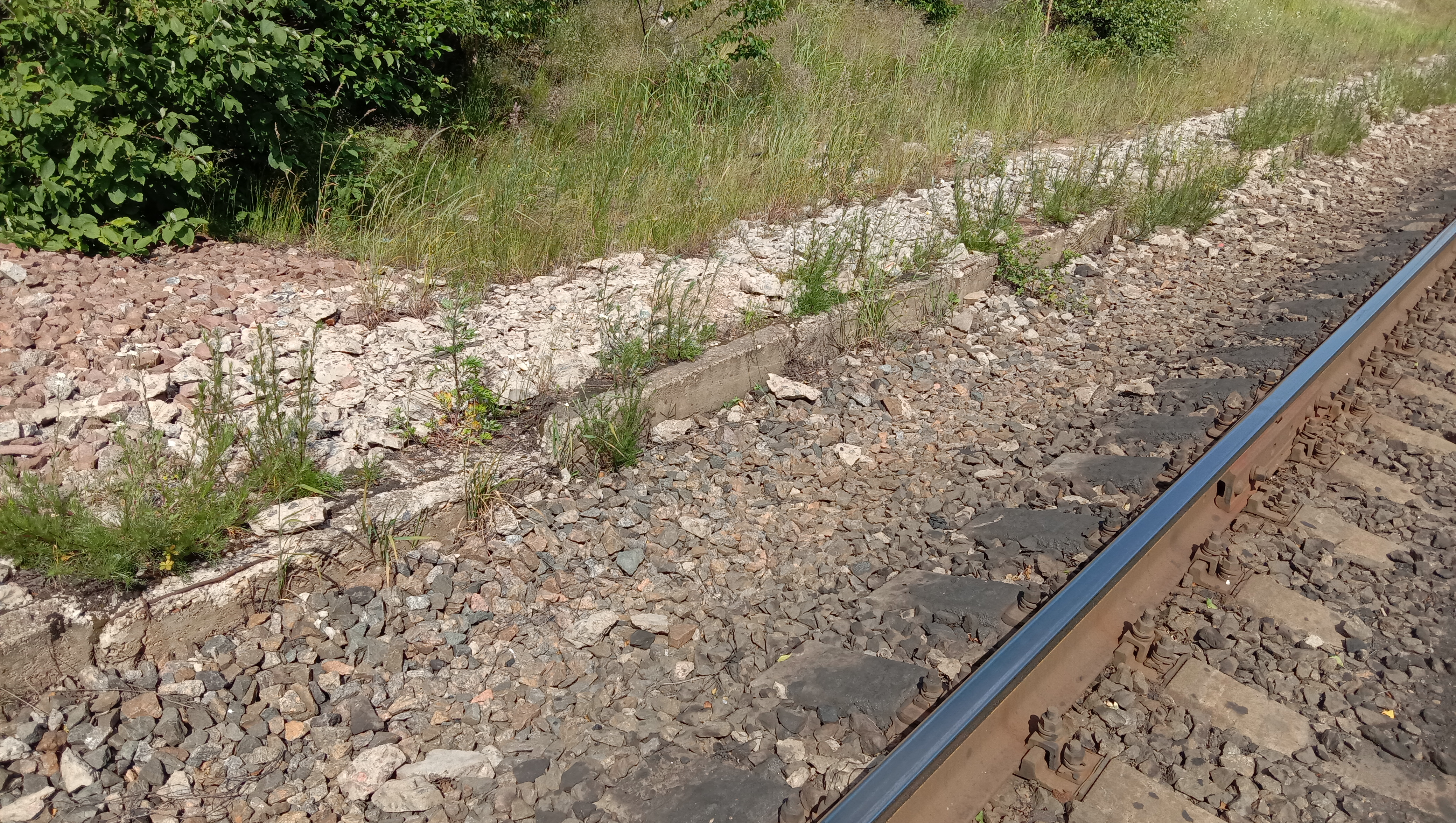 Пихтовое.